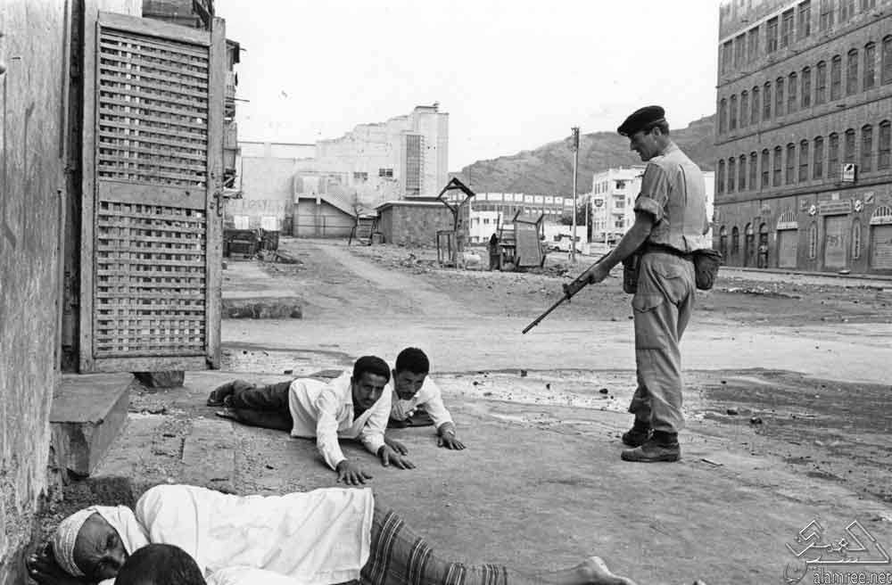 Арест демонстрантов в квартале Кратер. 1967 год.